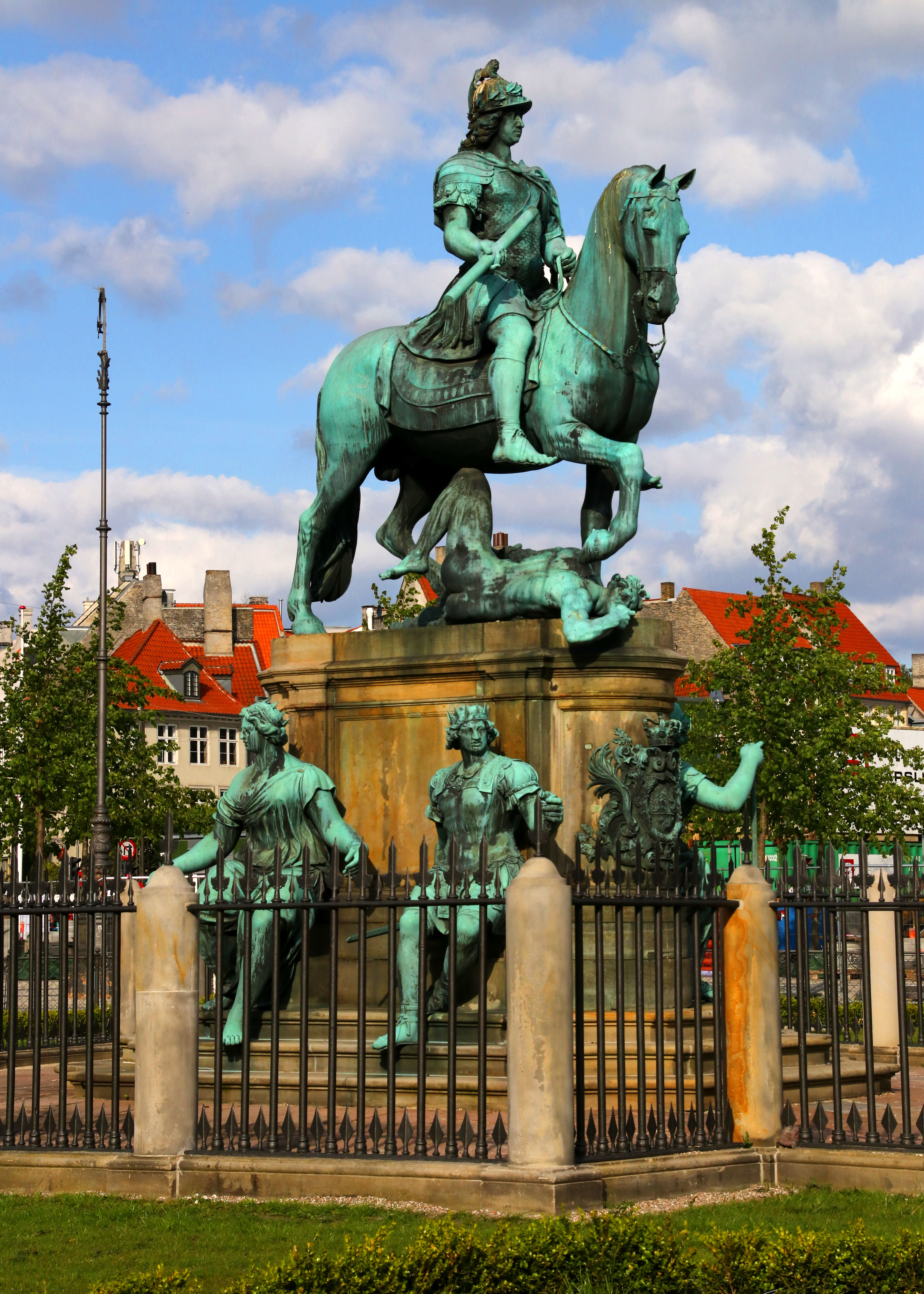 Christian V on Kongens Nytorv in Copenhagen, Denmark